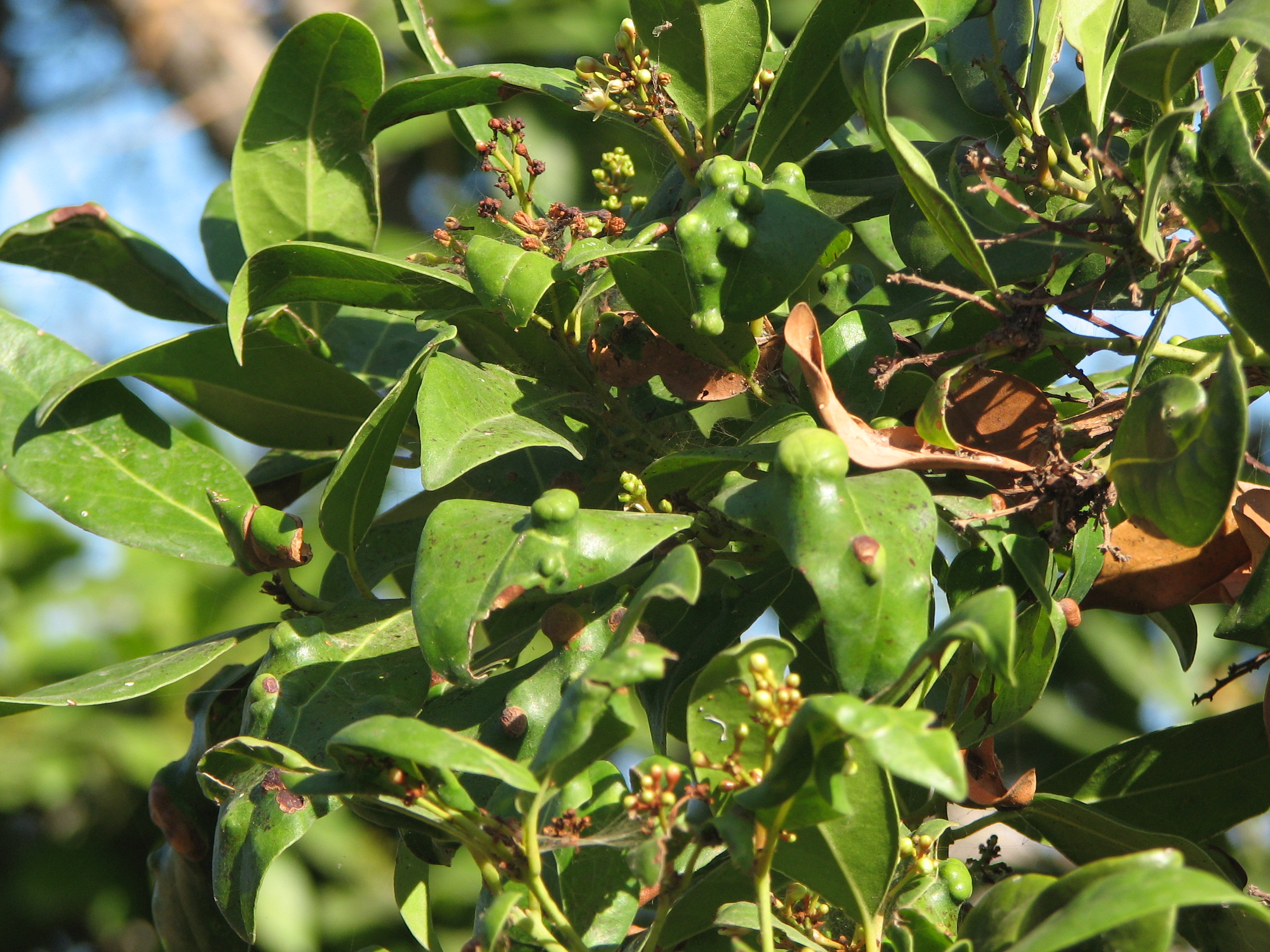 Barbuzano (Apollonias barbujana). Detalle de agallas en las hojas. Finca Boquín, Icod de los Vinos, Tenerife.